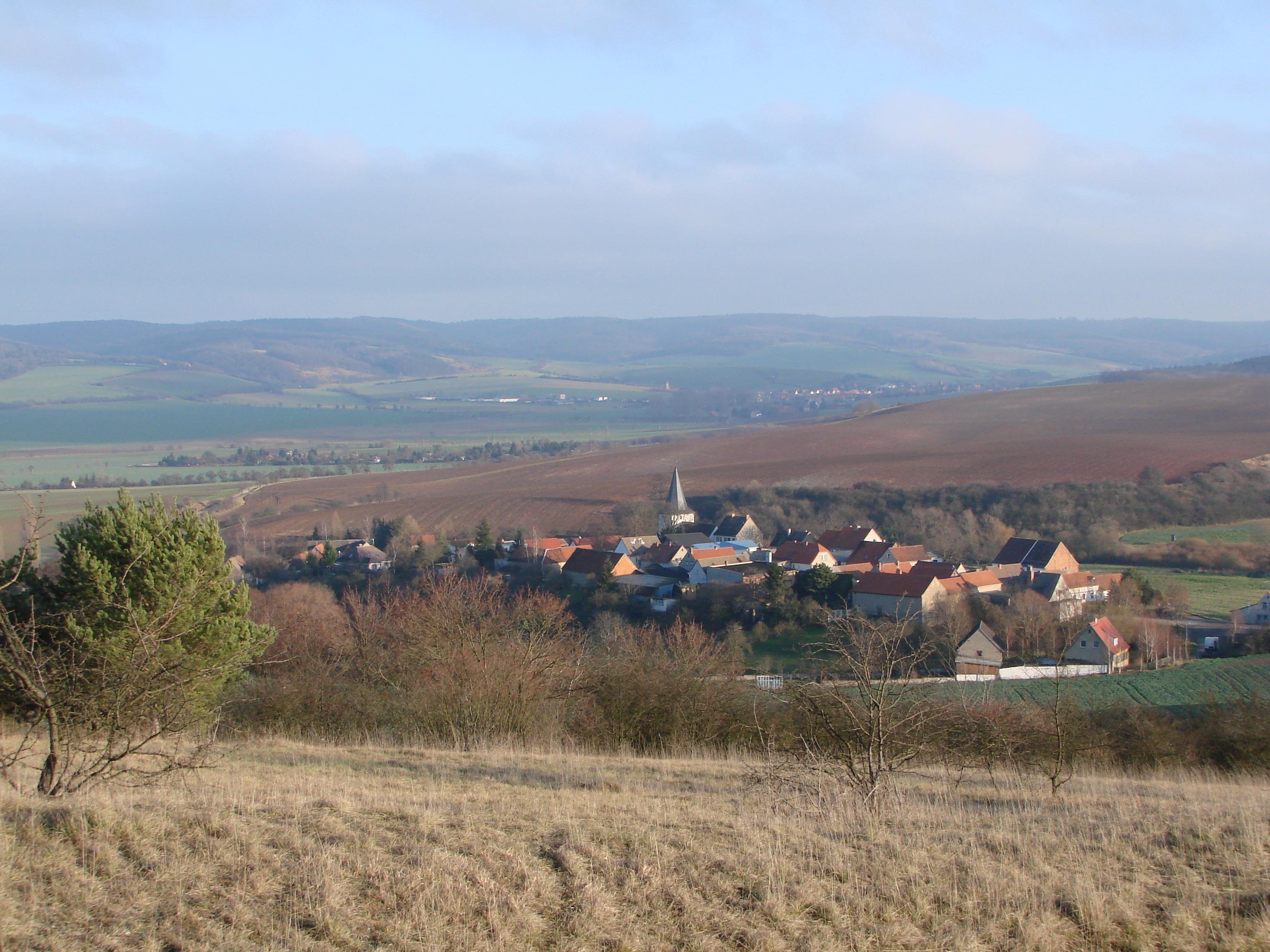 Schmücke Bilck nach Harras Hemleben (im Hintergrund die Hohe Schrecke)